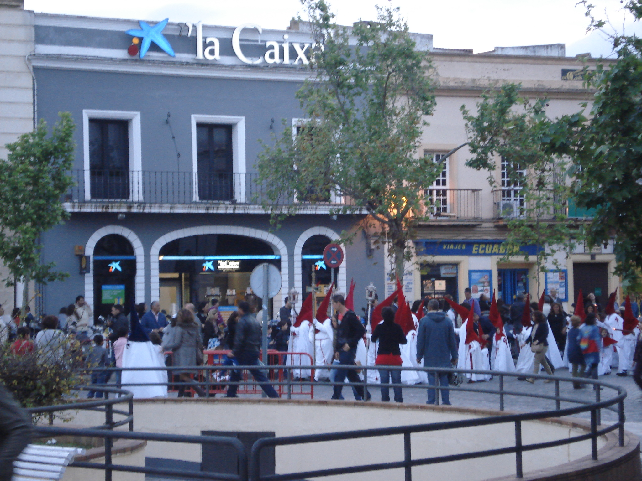 Semana Santa 2011 Jerez